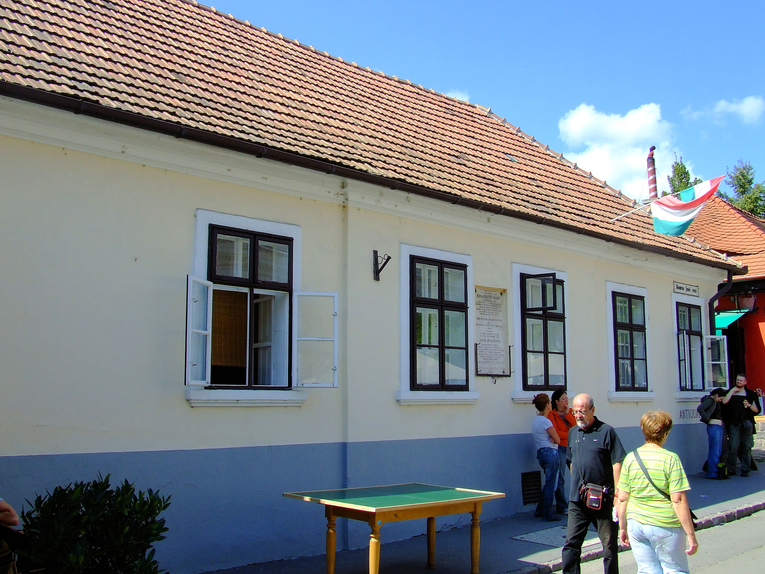 Jakov Ignjatović (1822–1889) magyarországi születésű szerb író, publicista, honvédtiszt, országgyűlési képviselő szülőháza Dumtsa Jenő utca 5, Szentendrén